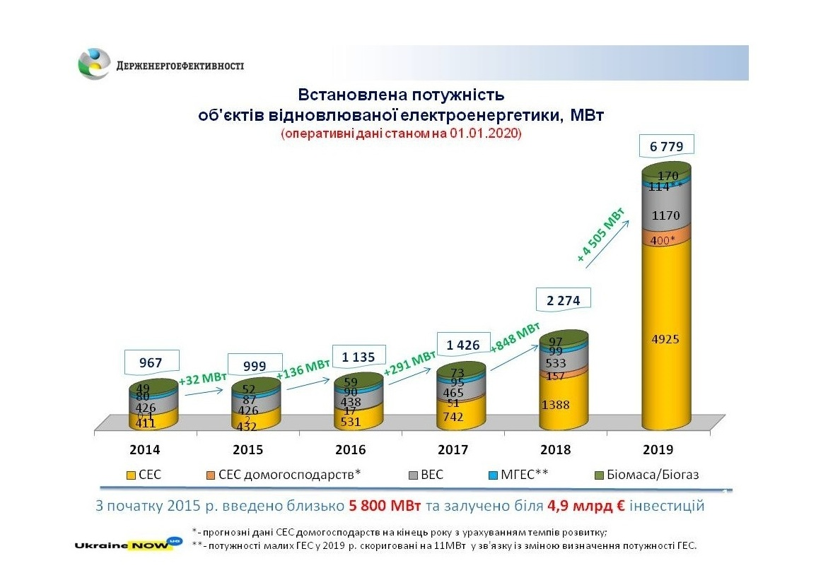 Потужності електрогенерації з відновлювальних джерел після запровадження "Зеленого тарифу" в 2019 році.